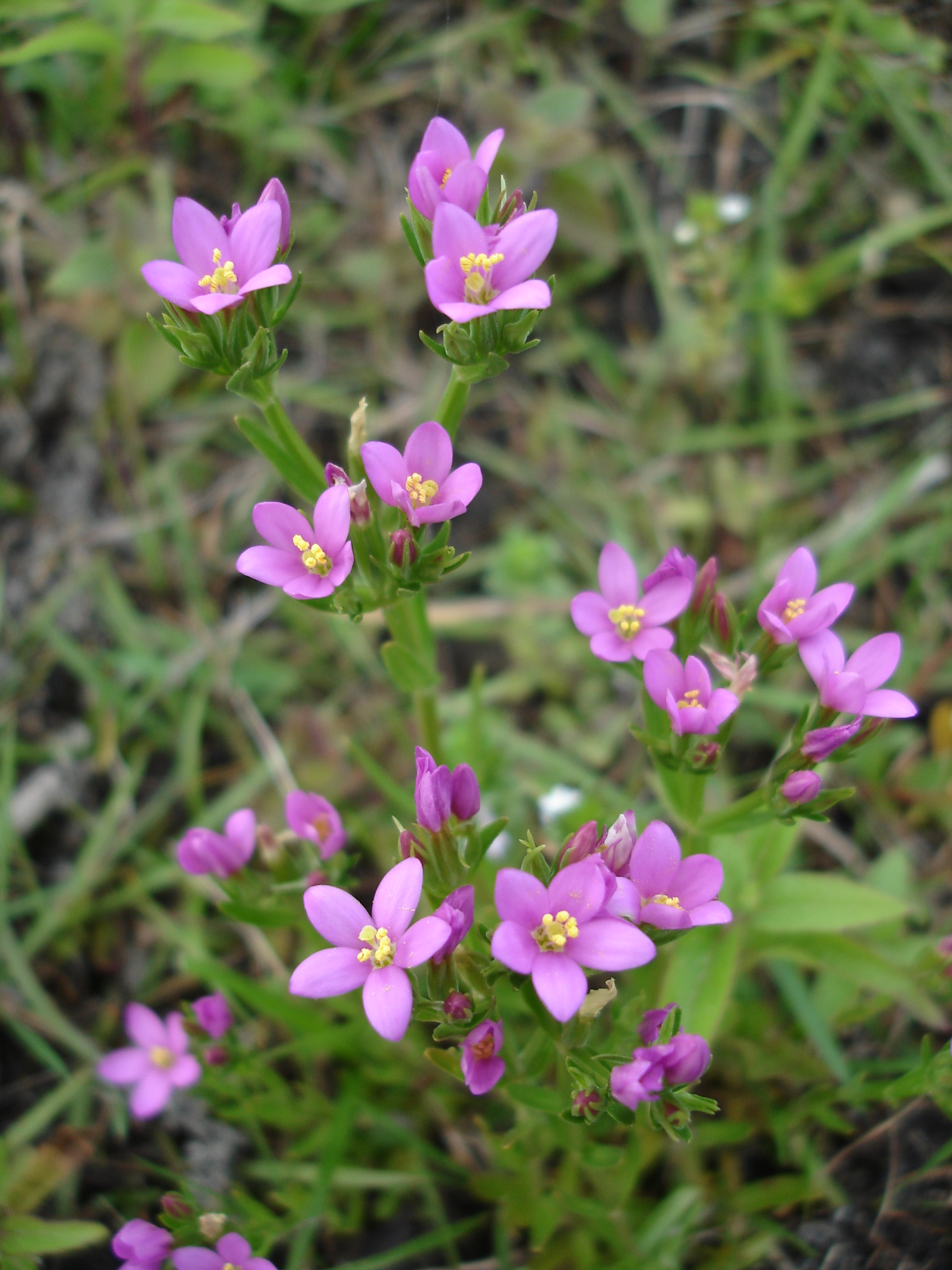 Duizendguldenkruid (Centaurium), Meijendel Wassenaar